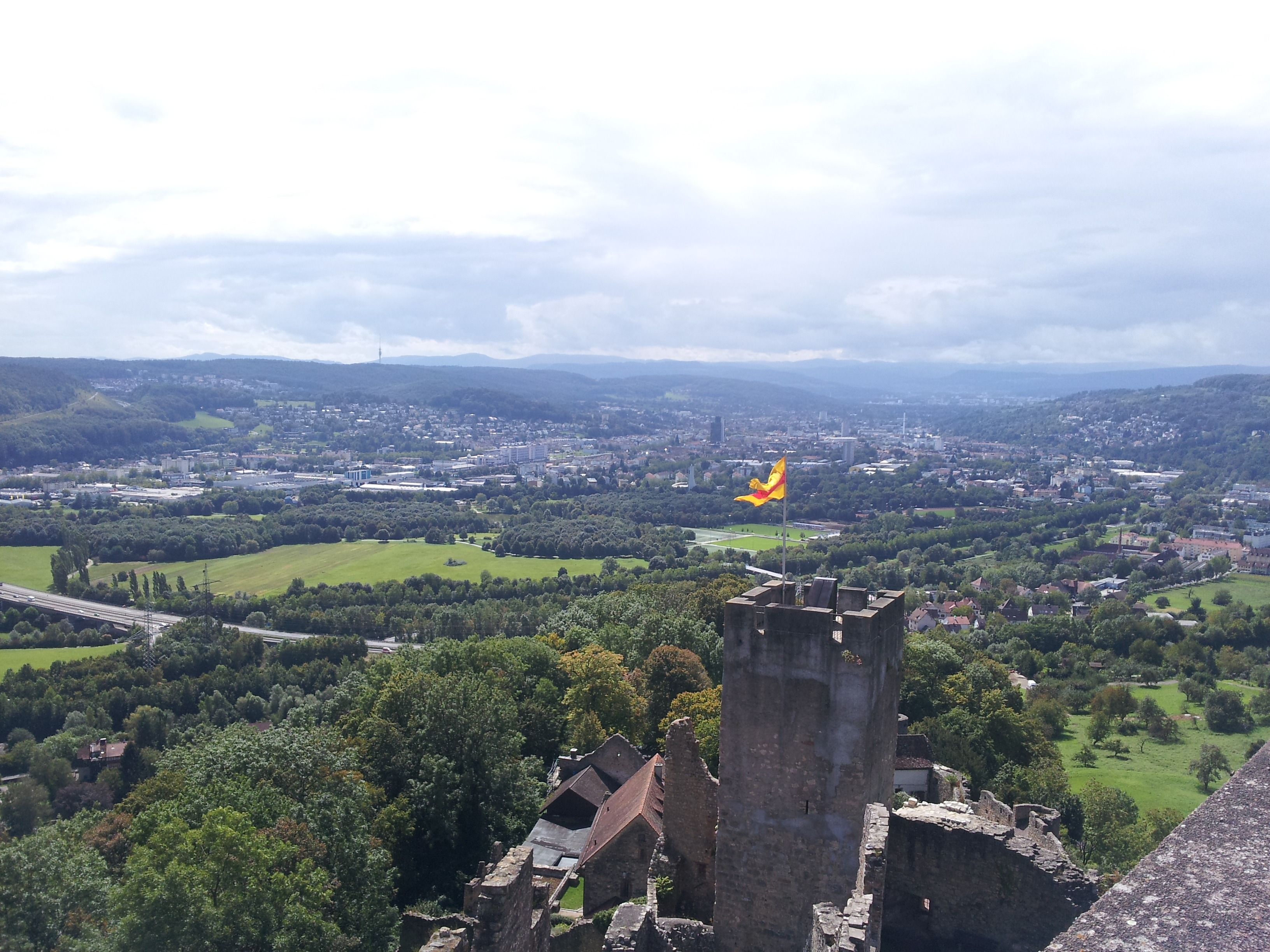 Château de Rothelin (Lörrach, Allemagne)